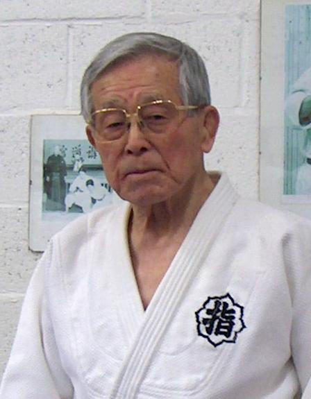 Ichirō Abe au judo club Poseidon-Ryu à Bruxelles, Belgique.